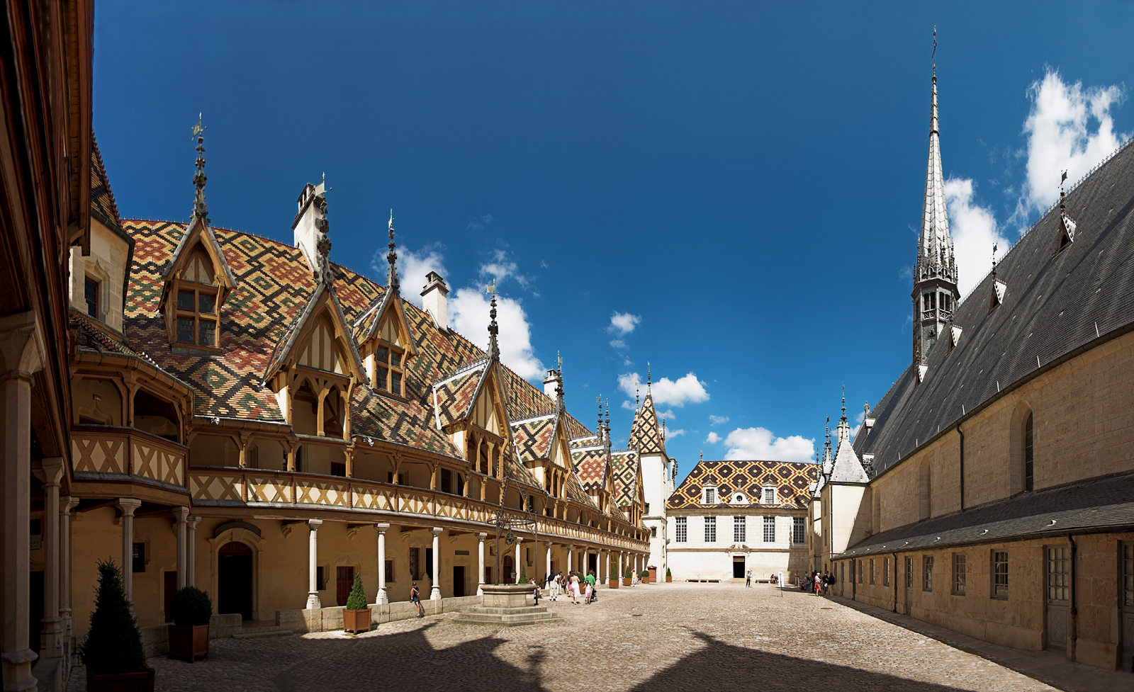 Innenhof des Hôtel-Dieu in Beaune, Frankreich (1443)